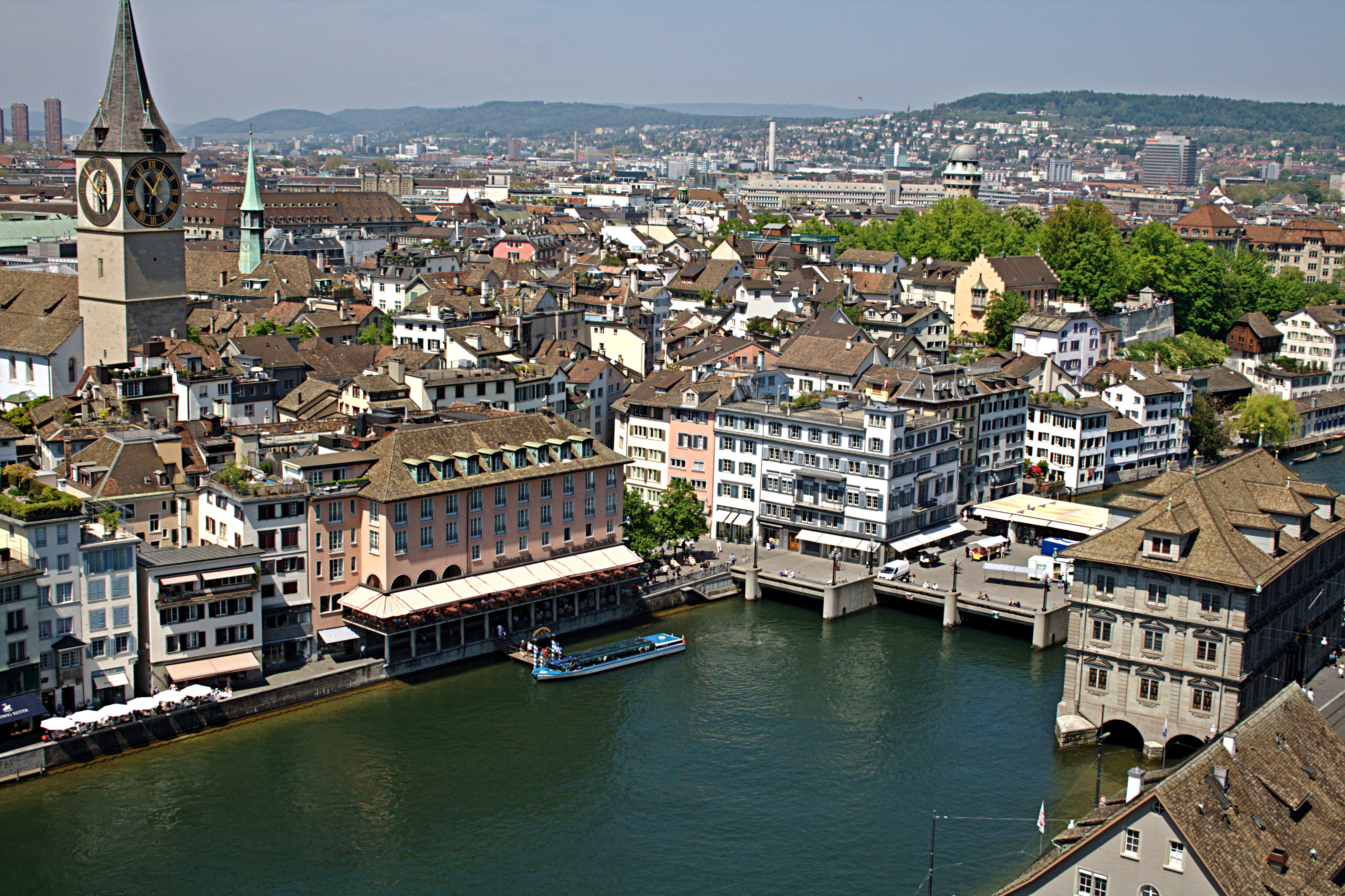 Zurich - Switzerland